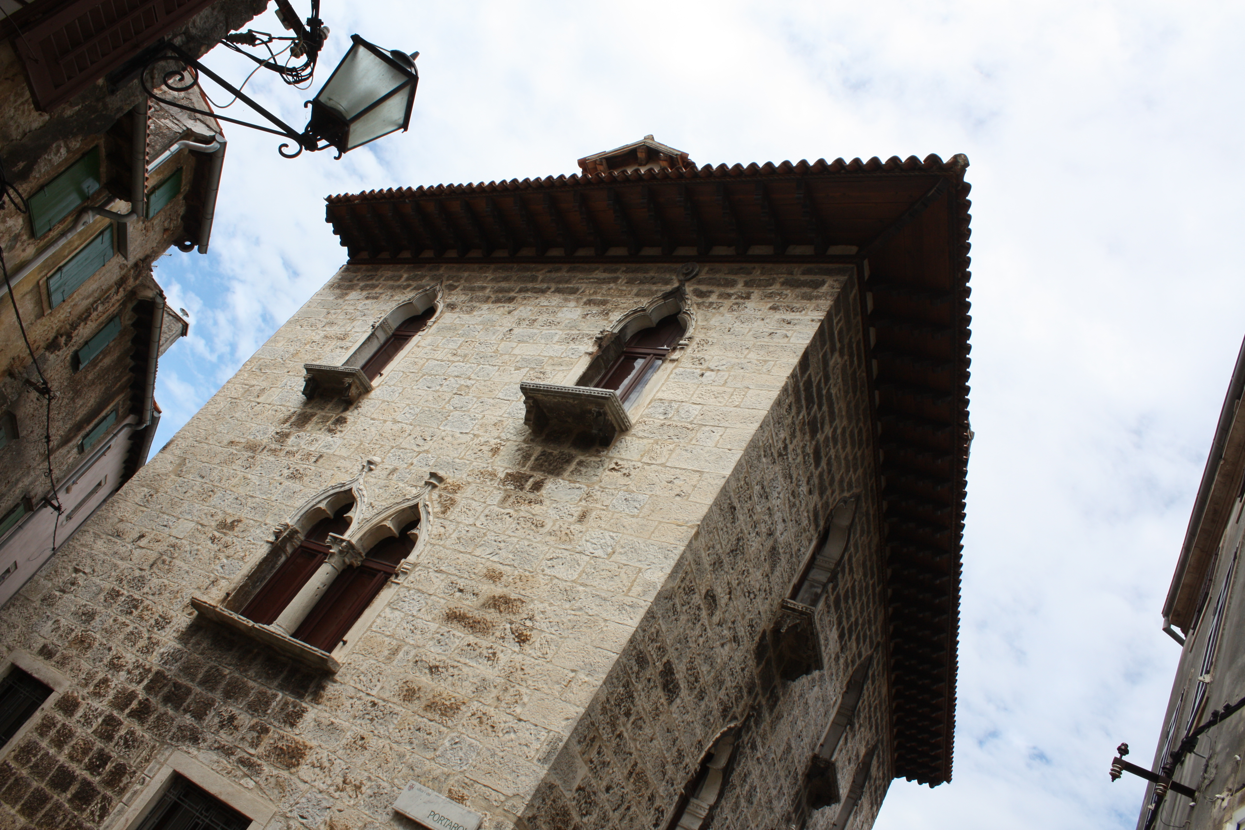 Bettica Palace, Vodnjan (HR)